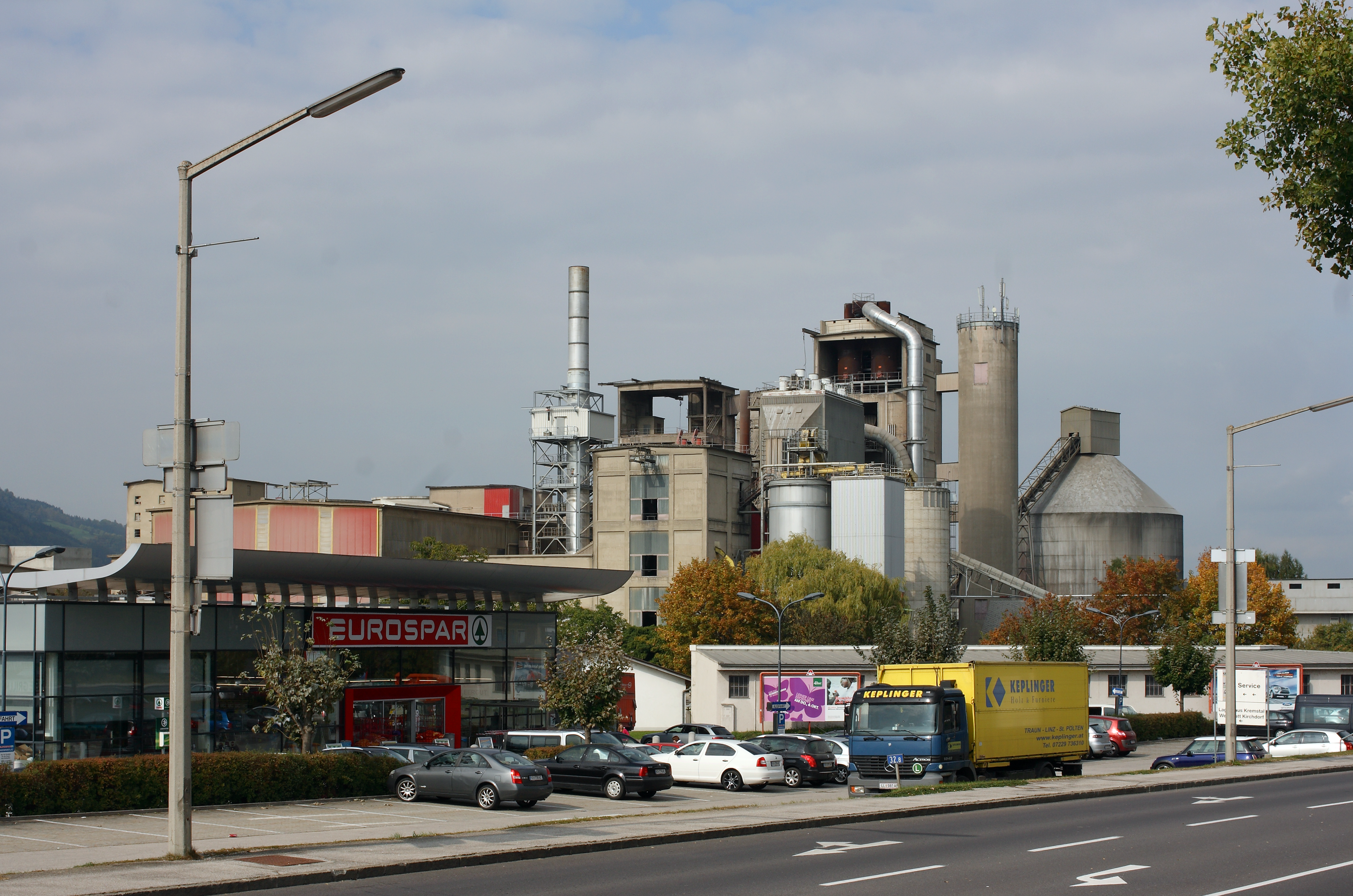 Das Zementwerk in Kirchdorf an der Krems